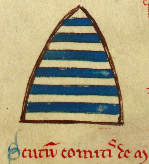 Inverted arm of Hugh Brun, count of Marches referring to his deaths.